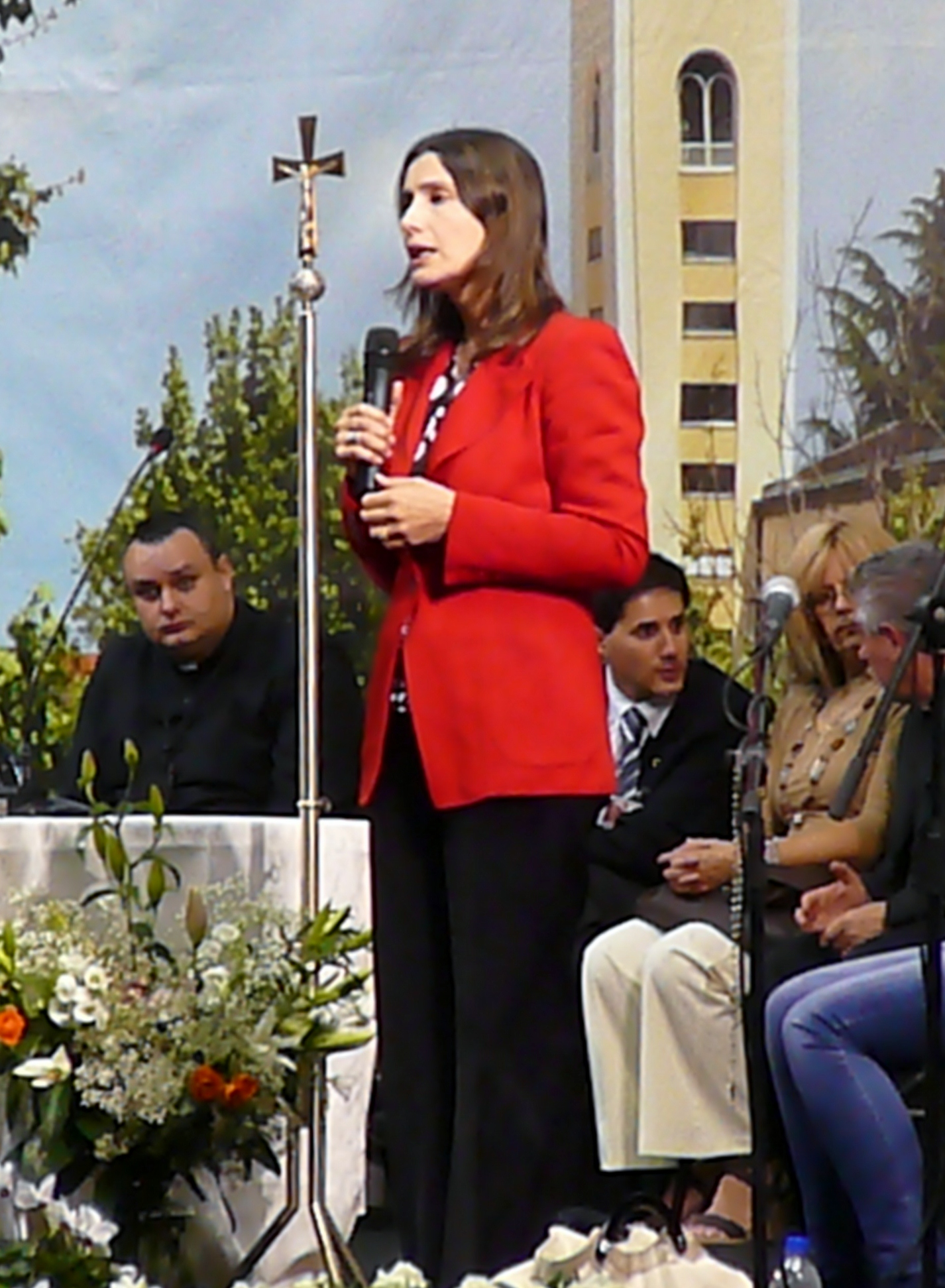 Claudia Koll al Paladesio mentre testimonia la sua svolta religiosa. Sul fondale, un'immagine da Međugorje